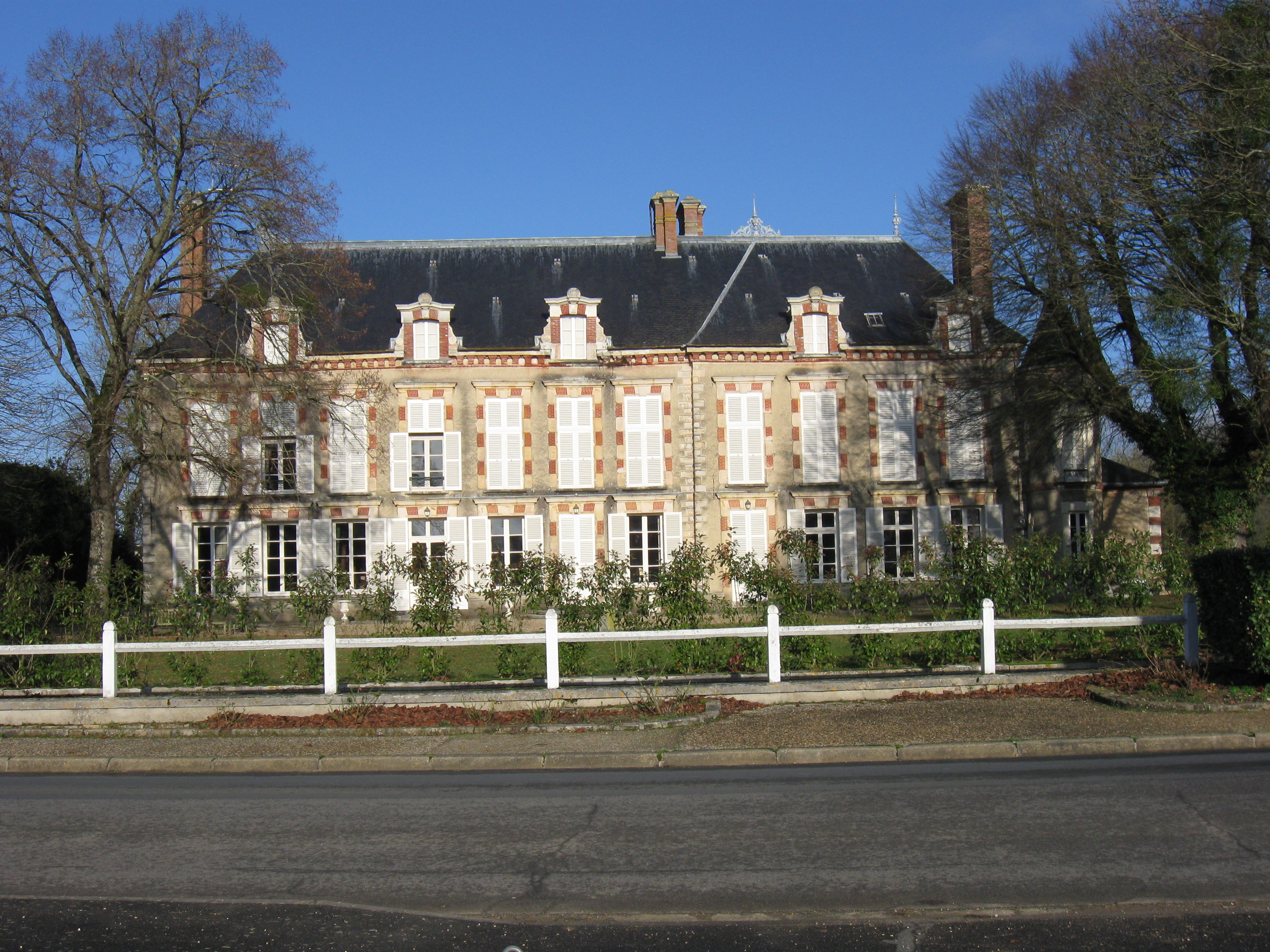 Château de Barbey. (Seine et Marne, région Île-de-France).